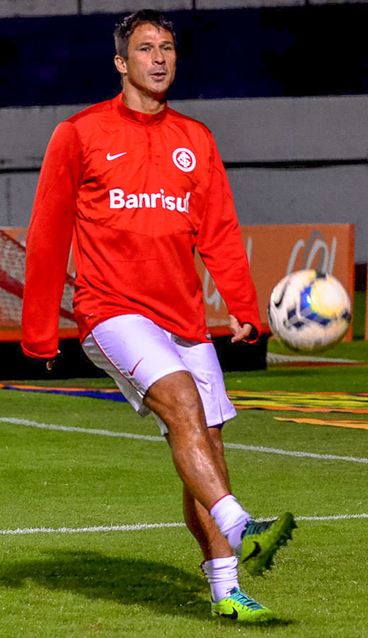 Foto: Geremias Orlandi/Aguante Comunicação